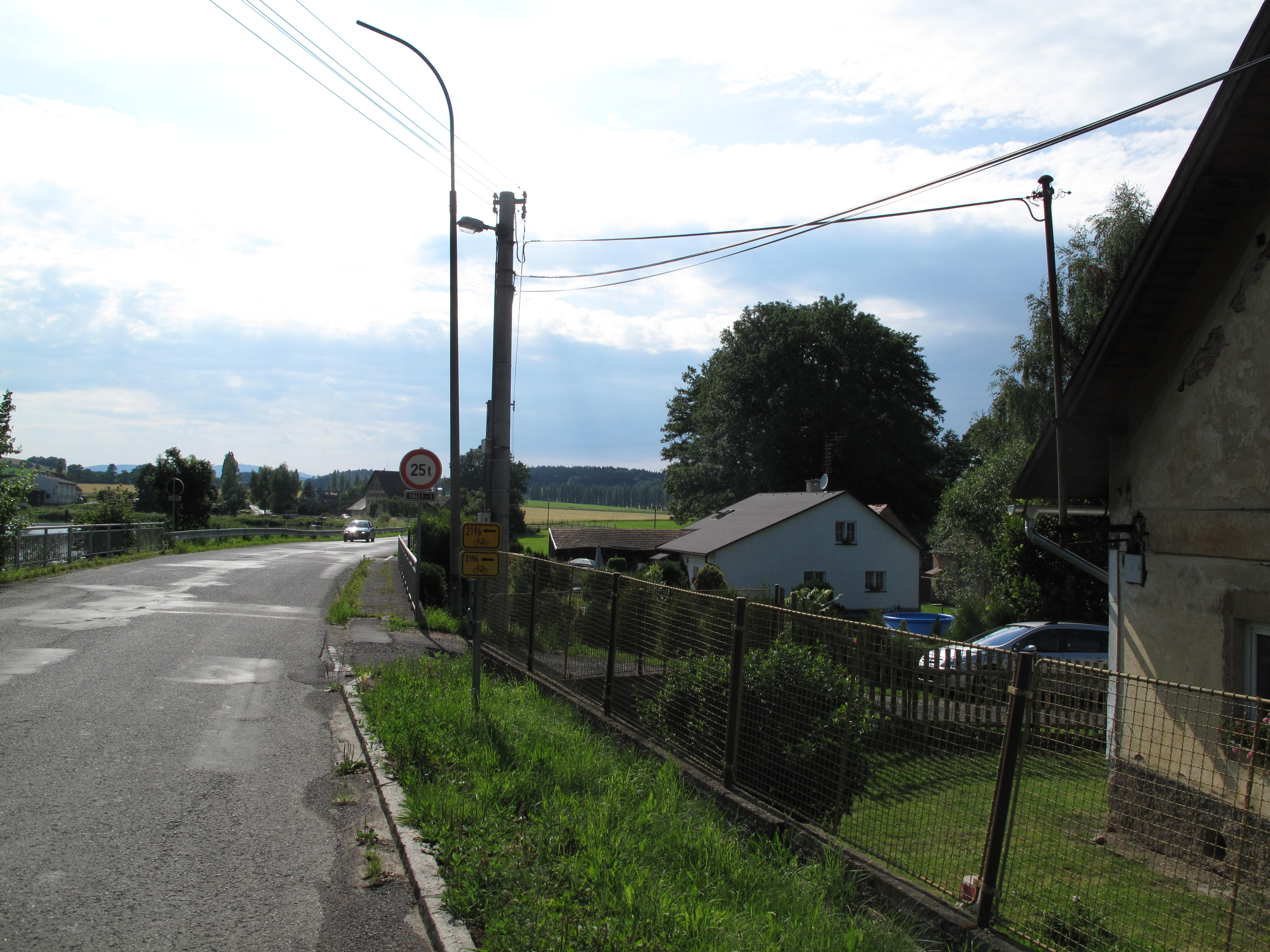 Nový Dvůr, část obce Kout na Šumavě